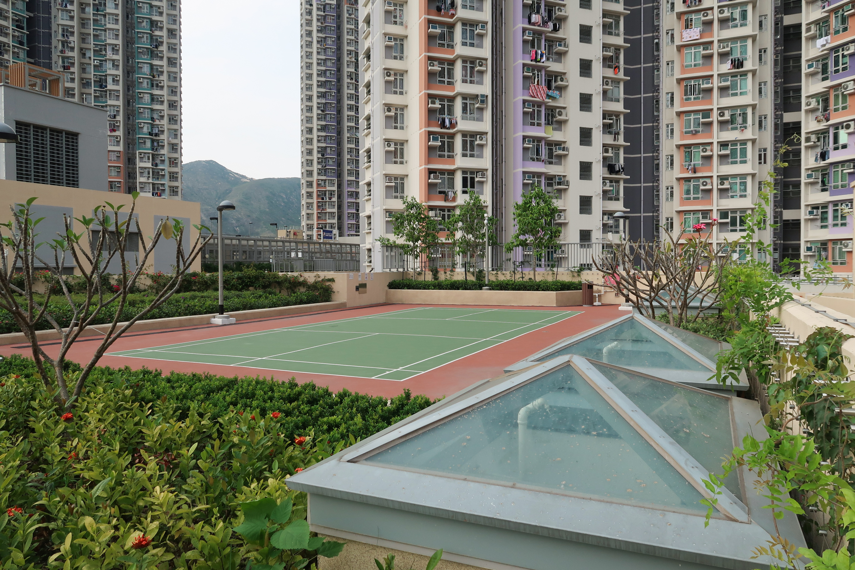 Yan Tin Estate podium Badminton Court